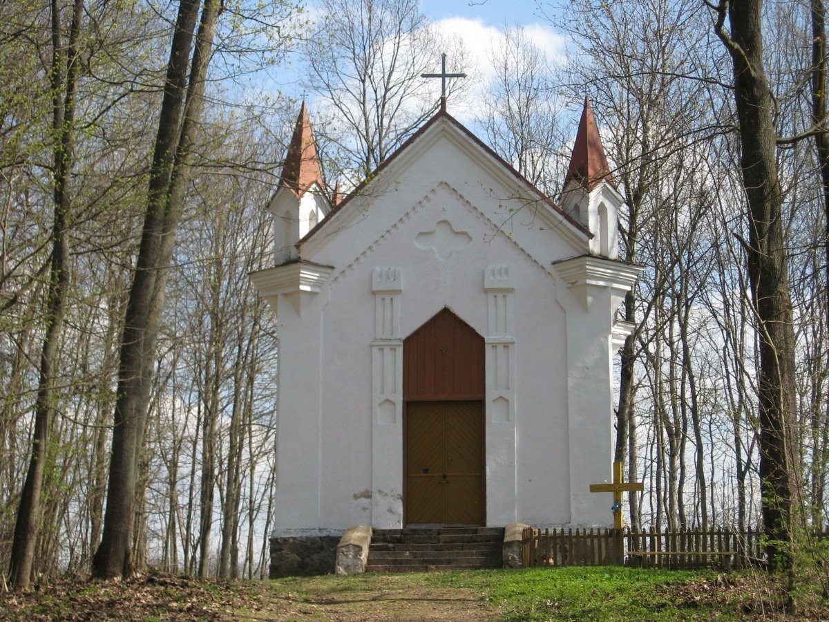 Абадоўцы. Капліца